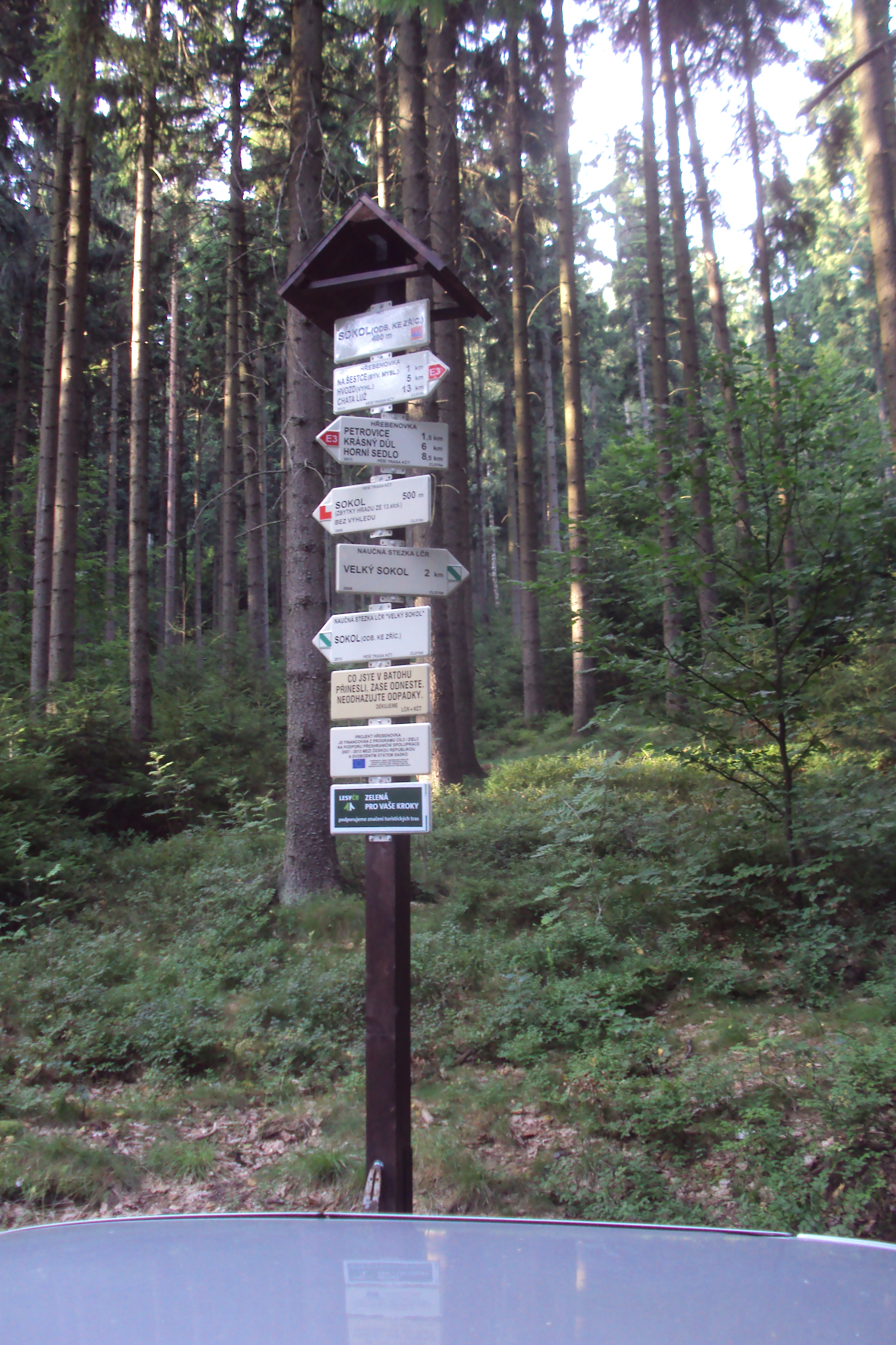 Nový rozcestník pod vrcholem kopce Sokol